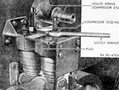 Volute spring unit from M3 Stuart tank